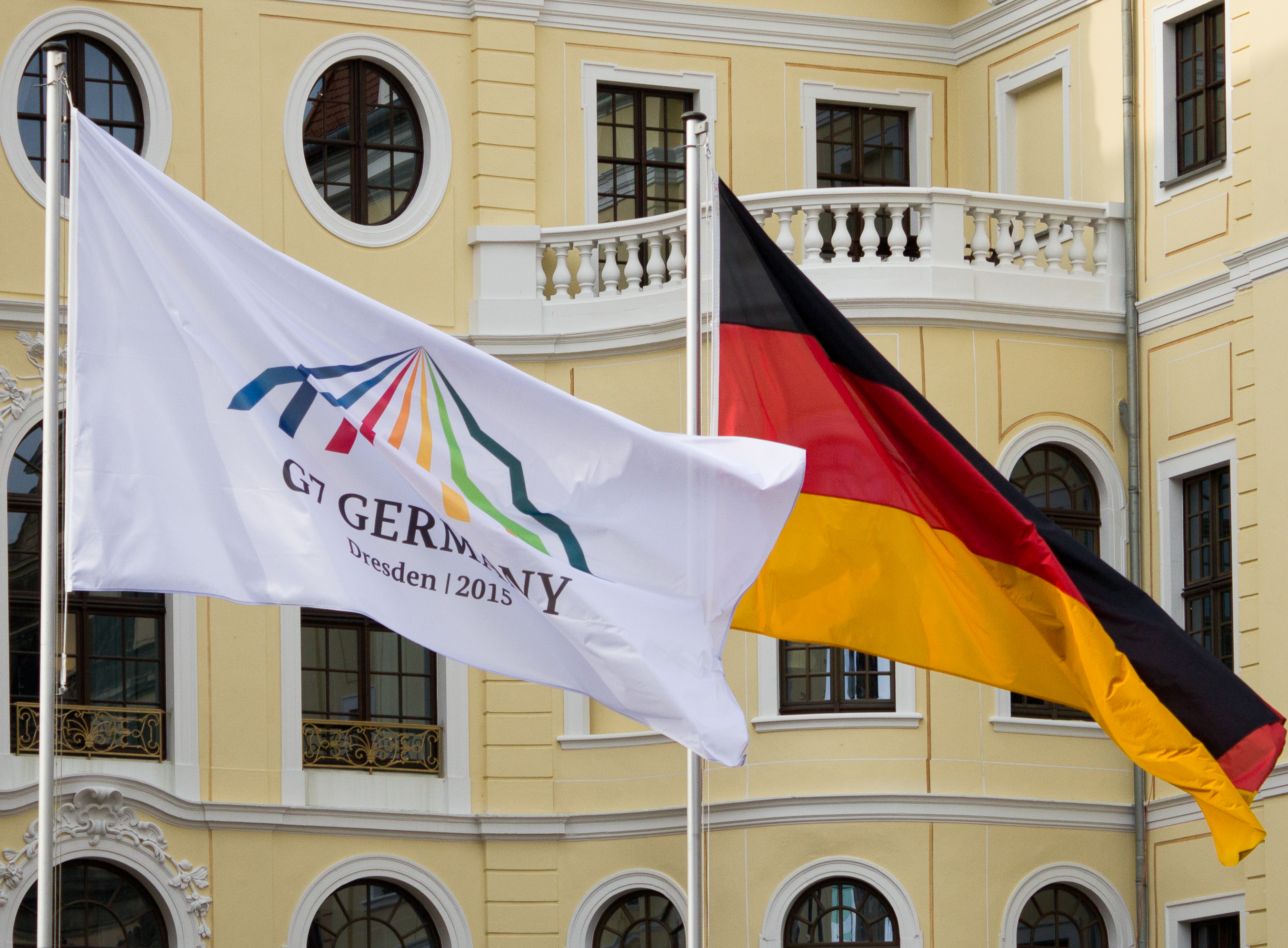 G7 Meeting of finance ministers 2015 Dresden, Germany